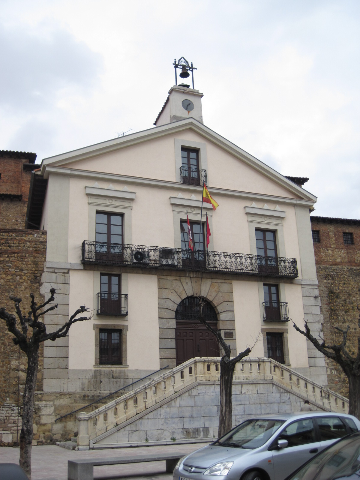 Archivo Histórico Provincial de León (España).